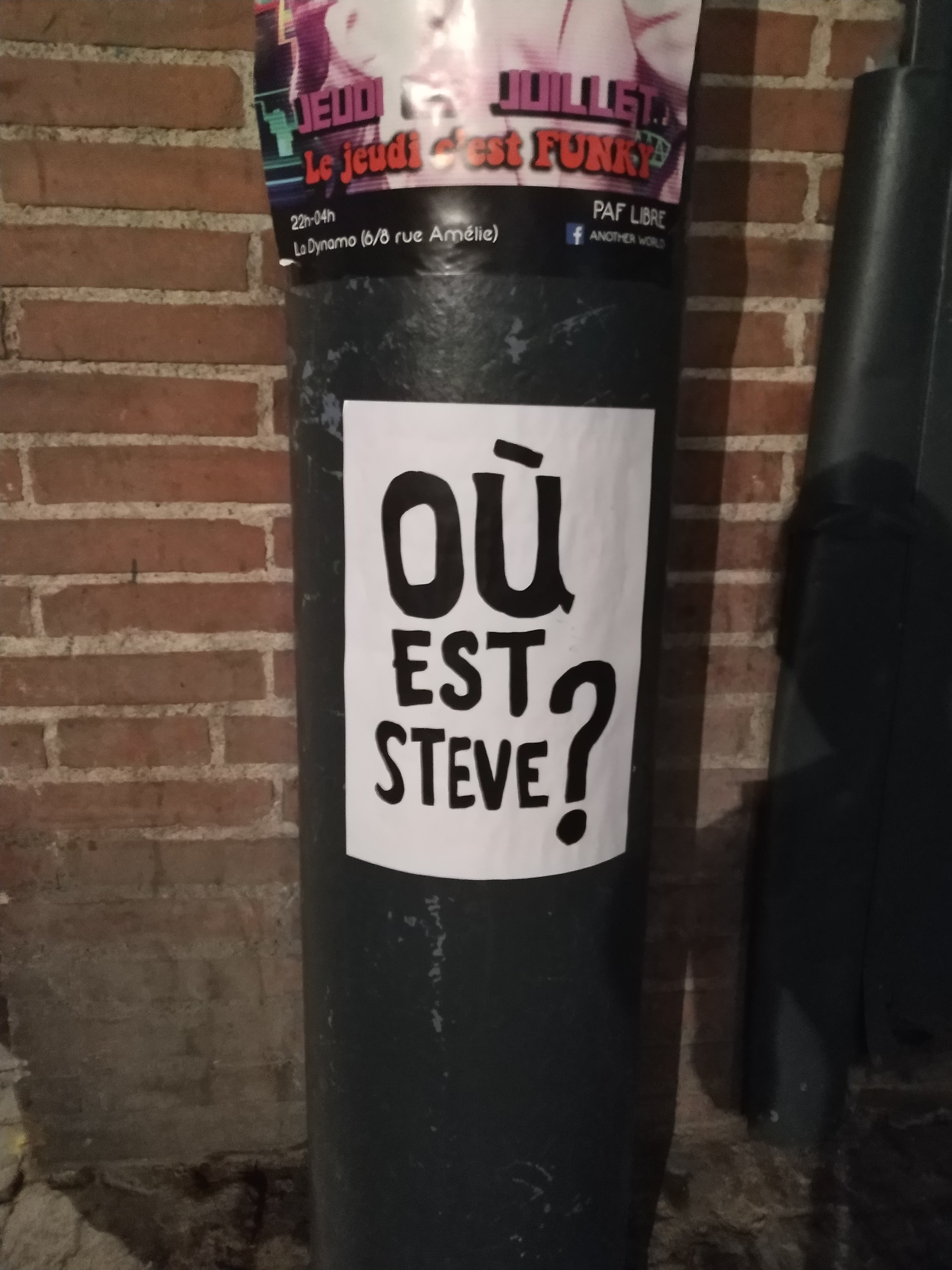 Un sticker "Où est Steve ?" sur un poteau à Toulouse, censé interpeller sur la disparition dudit Steve Caniço.